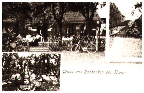 Torun, Poland - Barbarka